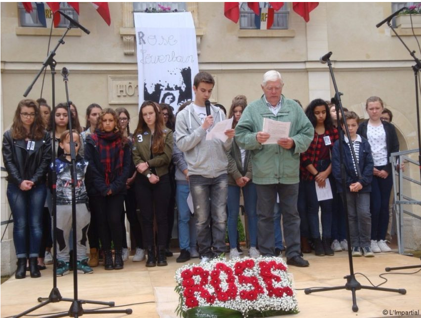 Illustration d'une cérémonie à Chaumont-en-Vexin, le 18 Juin 2016